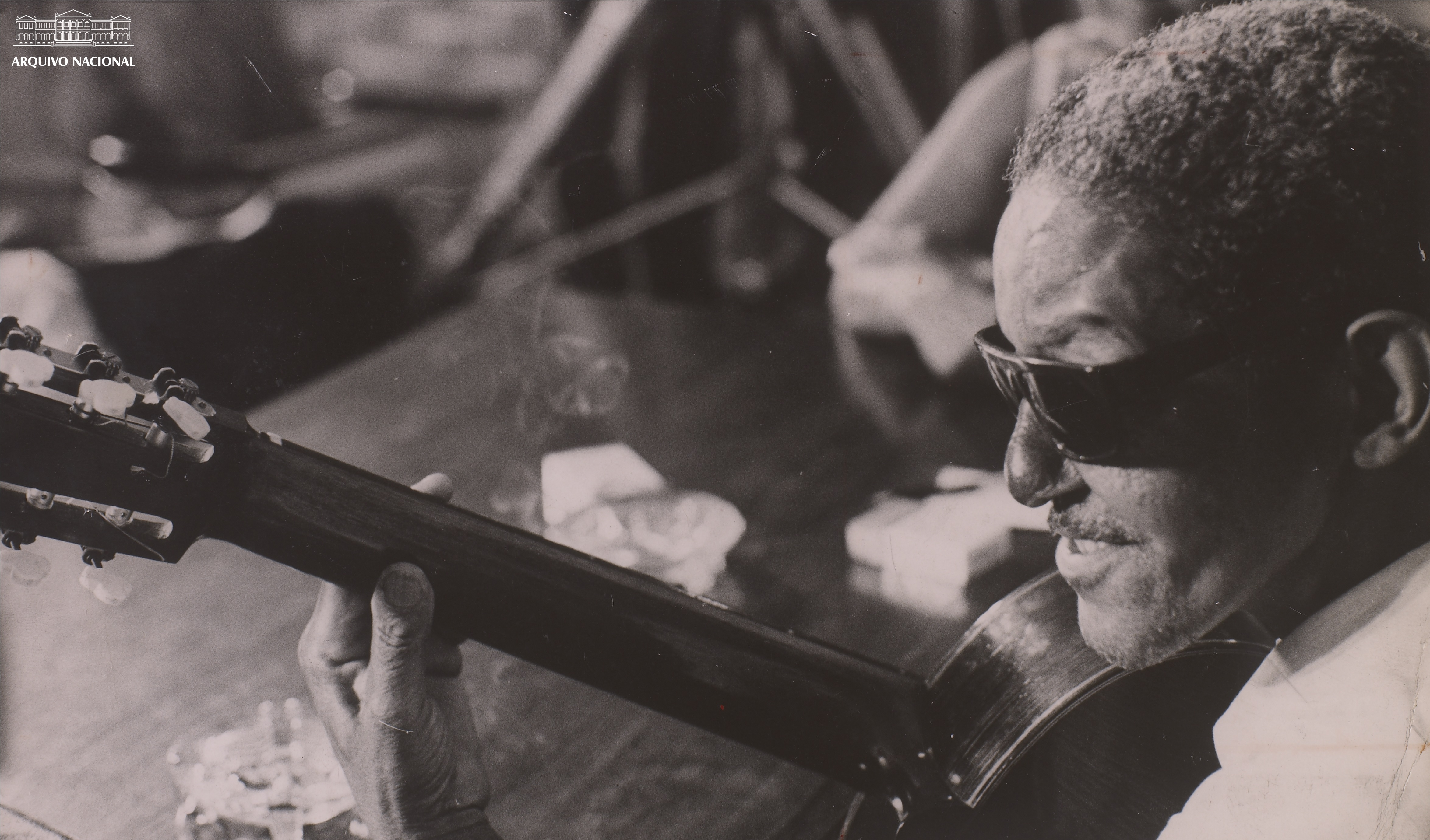 Angenor de Oliveira, o Cartola, em 1967. Compositor, cantor e instrumentista. Arquivo Nacional. Fundo Correio da Manhã